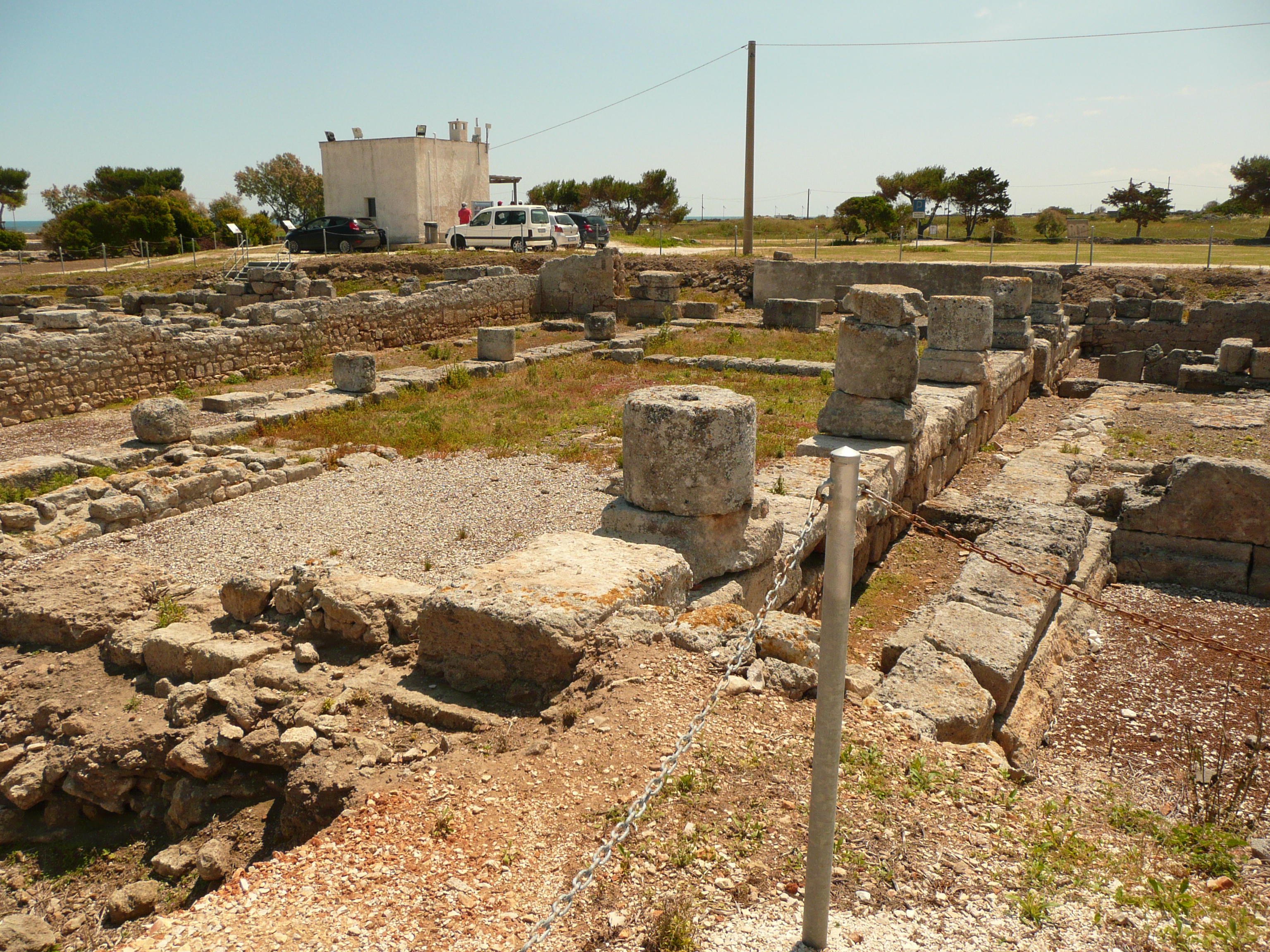 Parque arqueológico de Egnazia, Apulia.